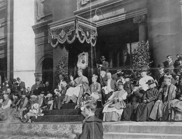 Le cardinal Vannutelli bénissant les quelque 20 000 enfants venus le saluer lors du Congrès eucharistique international de 1910. À sa gauche, le cardinal Logue, et à sa droite, Mgr Bruchési. Le cardinal Vannutelli bénissant les quelque 20 000 enfants venus le saluer lors du Congrès eucharistique international de 1910. À sa gauche, le cardinal Logue, et à sa droite, Mgr Bruchési.